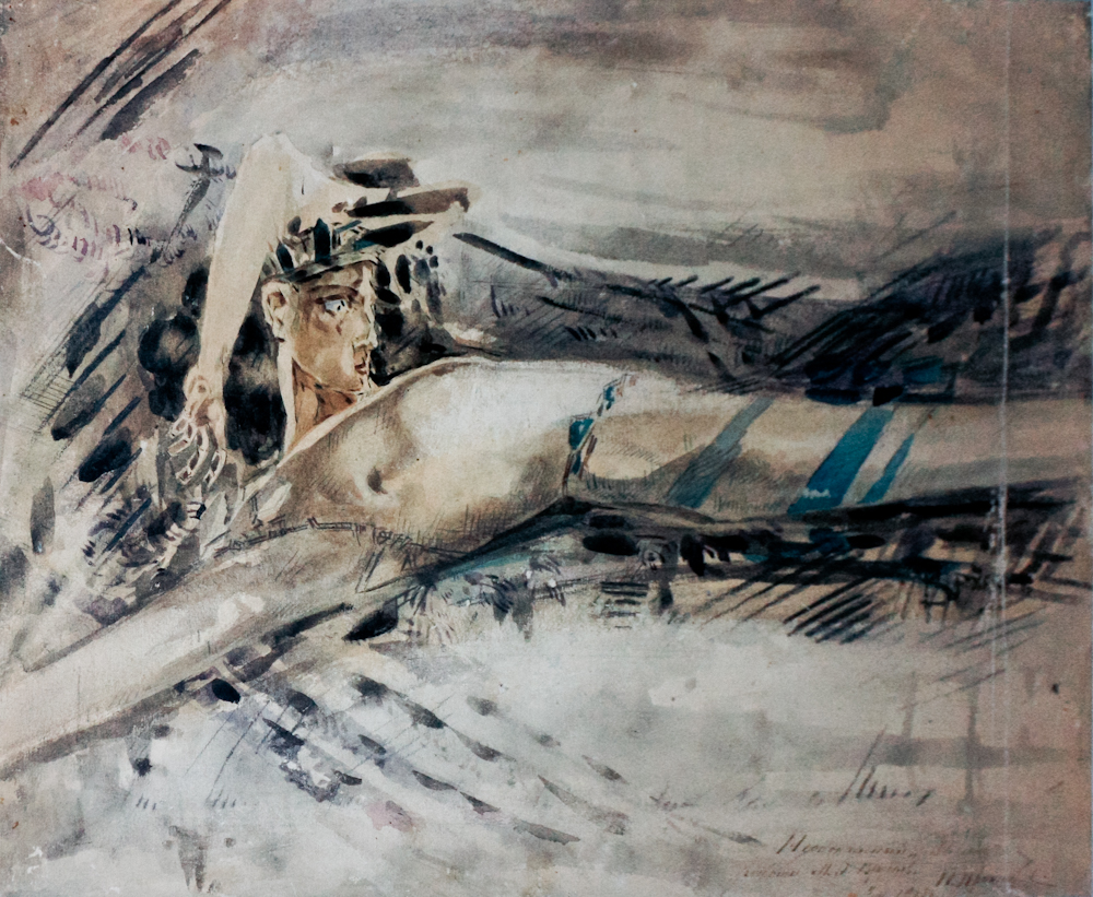 Эскіз "Дэман зрынуты"